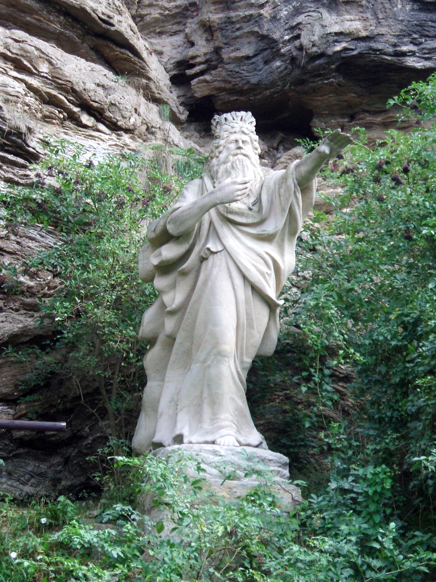 Erlkoening in Jena/Germany